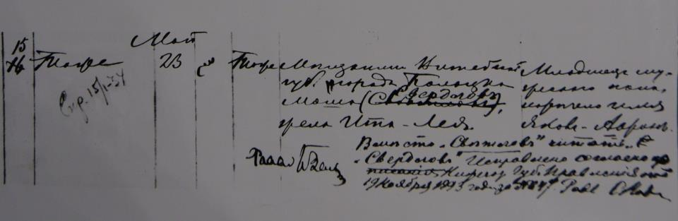 Запись о рождении Я. М. Свердлова в Нижегородской книге записей рождения еврейских детей за 1885 г. «Май 23» / «Младенец мужескаго пола наречен именем Яковъ-Ааронъ» / имя отца Моше / изначально фамилия записана как «Светловъ», впоследствии исправлена на «Свердловъ» Публикуется как источник для статьи Свердлов, Яков Михайлович. Получено Евгением Зориным в Музее истории Екатеринбуга с помощью Евгения Бурденкова.